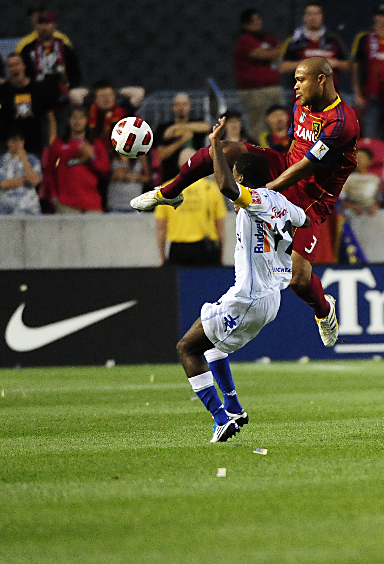 Nikon D3S w/ 200-400mm f4 1/2000 @ f4 ISO 9000